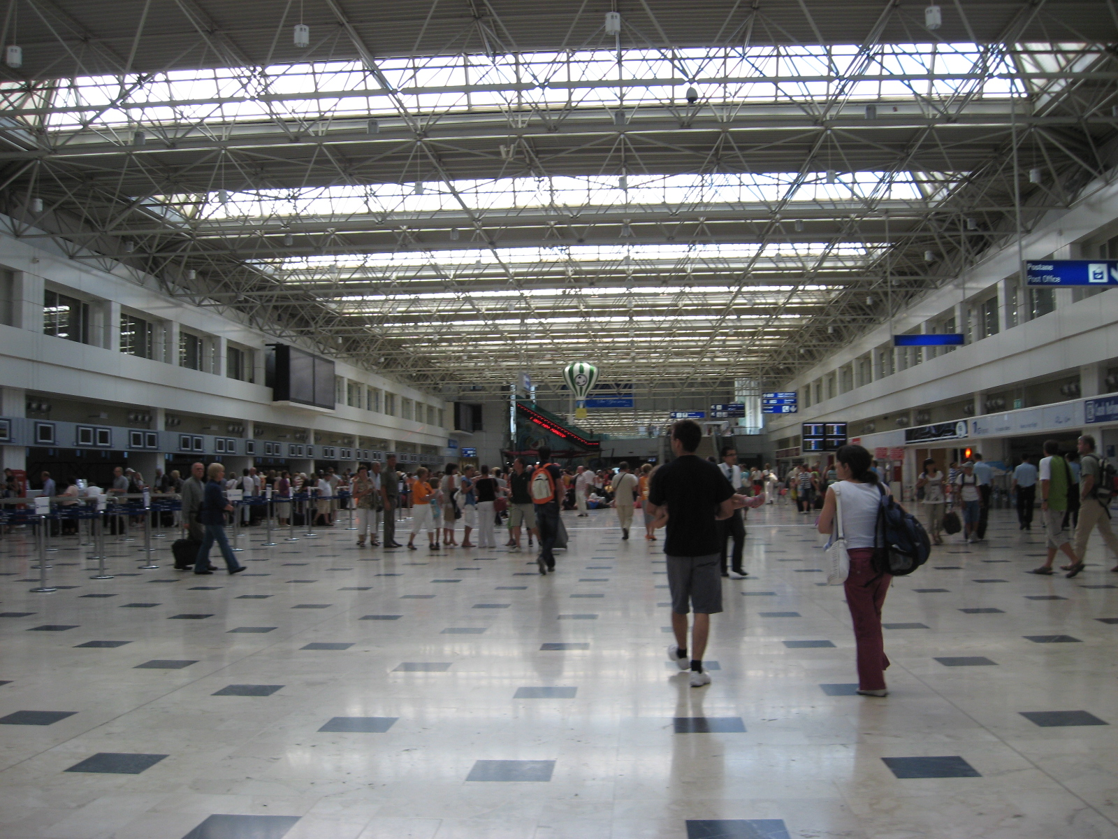 Dragan Cvetkovic Nis Srbija sopstvena slika Licensing